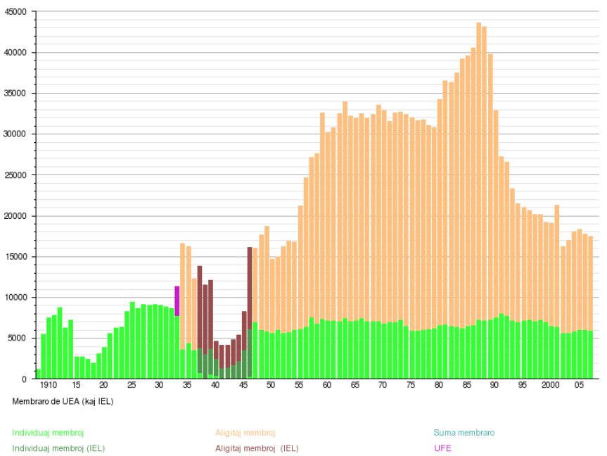 Membraro de UEA inter 1908 kaj 2007, Individuaj kaj Aligitaj Membroj. (La dosiero estas kreita en la ŝablono Template:Ŝ per EasyTimeline kaj aperas en la paĝo Membronombroj de UEA.) Kategorio:Statistiko de Esperantujo